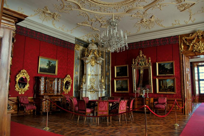 Roter Salon